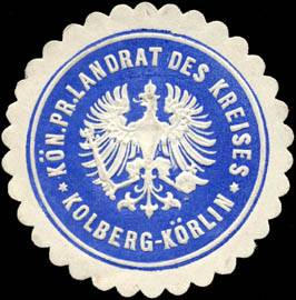 Sealing stamp Title: Königlich Preussischer Landrat des Kreises - Kolberg - Körlin Description: blau, weiß, geprägt Place: size: 4 cm